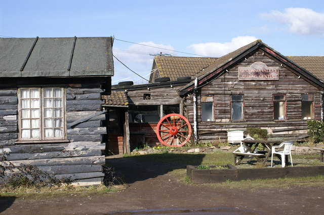 Gordano Valley Riding Centre